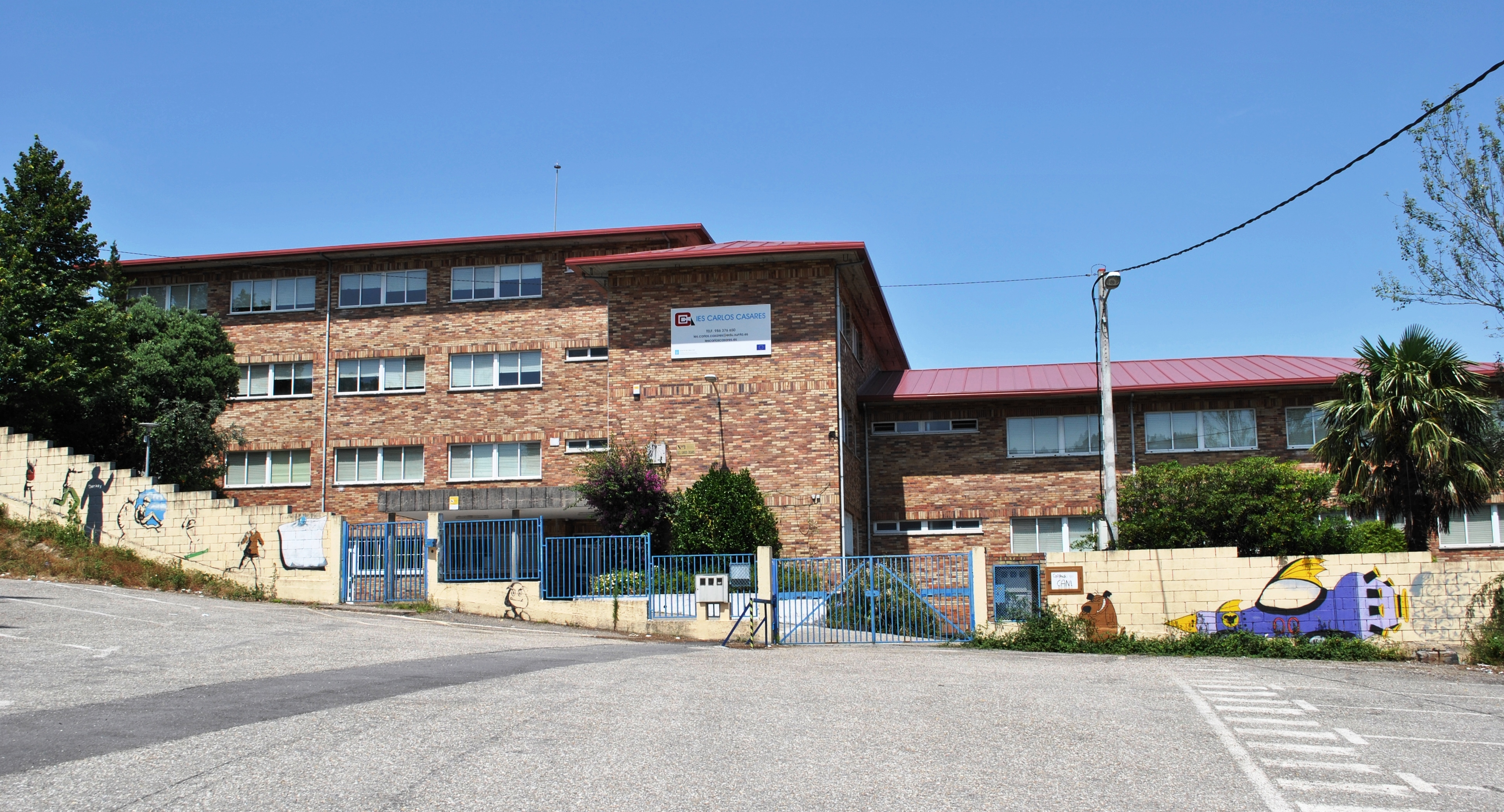 Véxase o título e as categorías